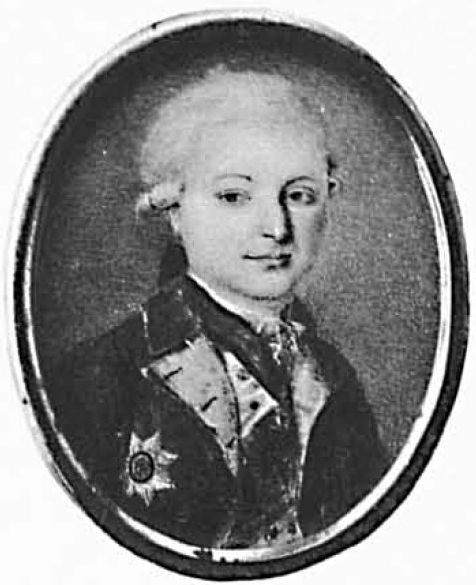 Князь Павел Гаврилович Гагарин (1777-1850)